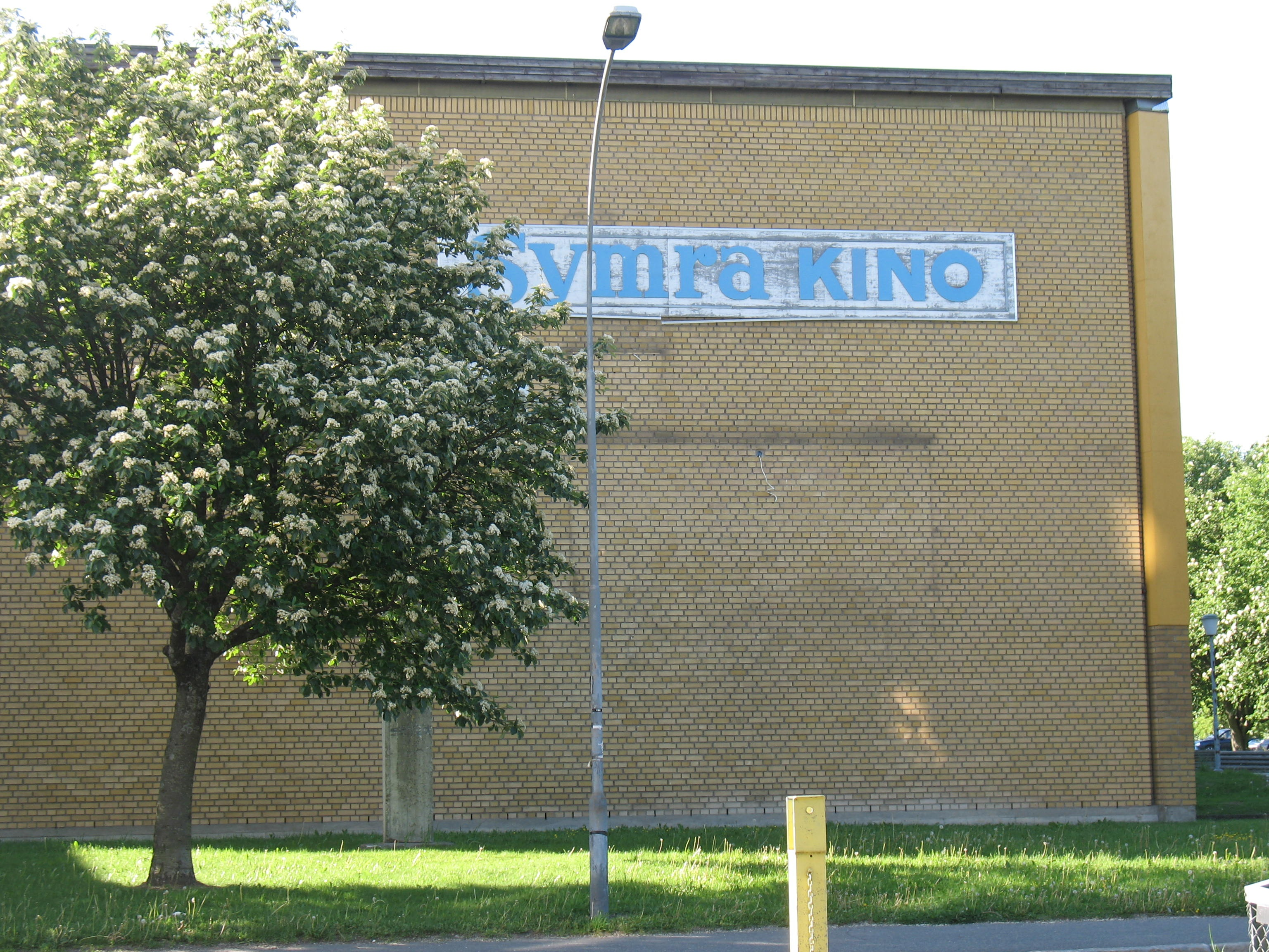 Symra kino på Lambertseter i Oslo